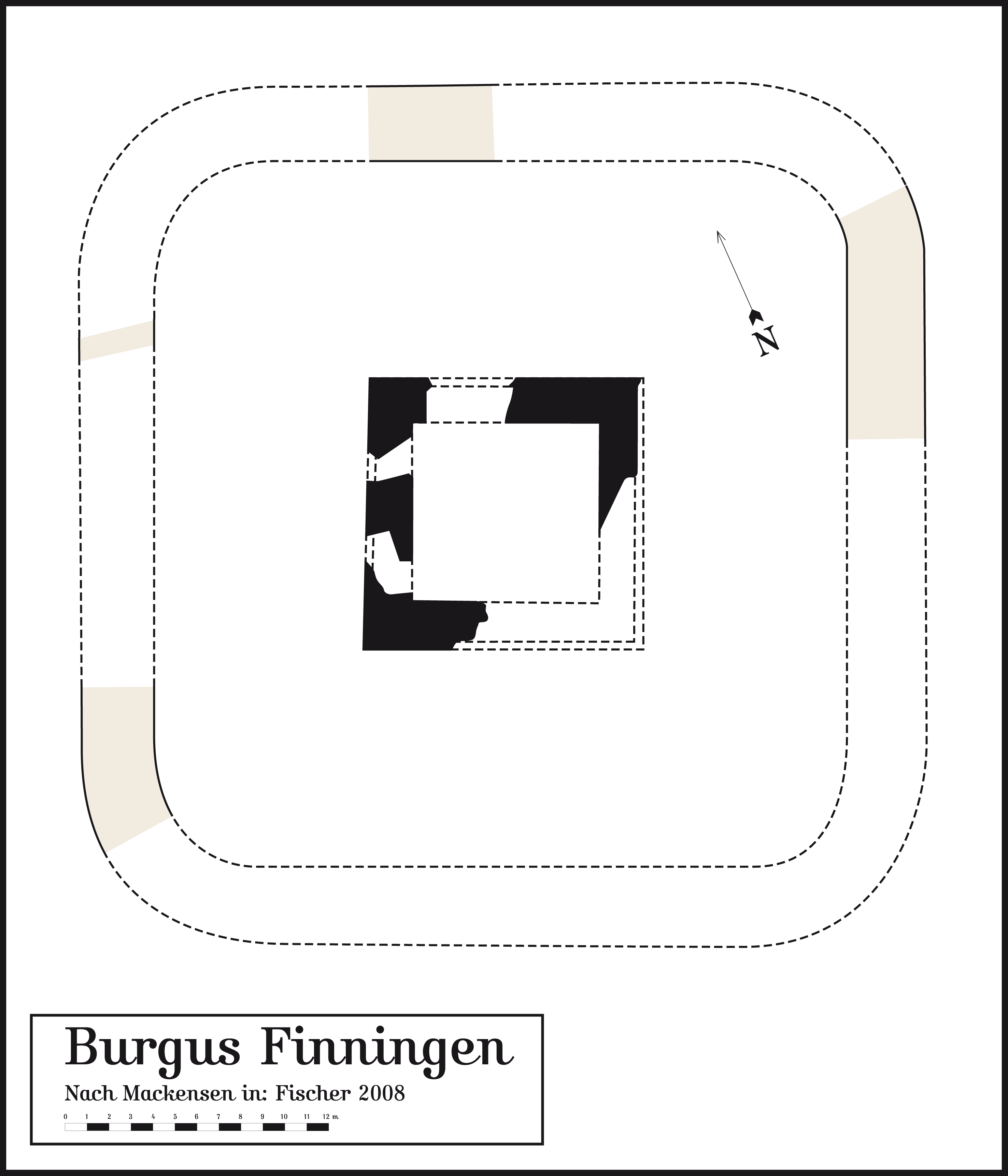 Der spätantike Burgus von Finningen, Landkreis Neu-Ulm, Bayern, Deutschland. Zeichnung auf Grundlage der Forschungen von M. Mackensen.